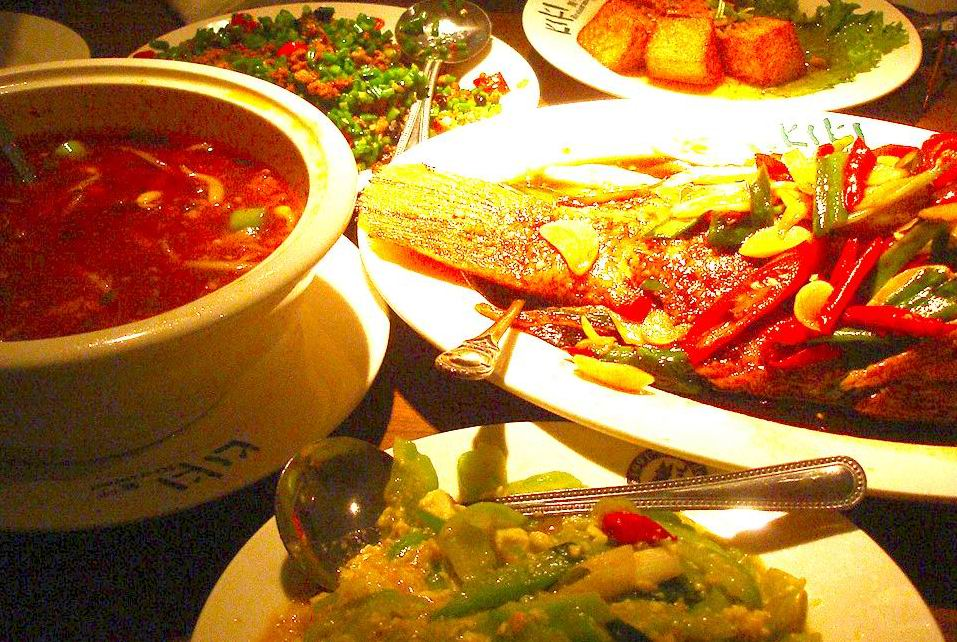 上傳者拍攝於2005.7.9.台北Kiki餐廳 這幾道菜，分別是：水煮牛肉、苦瓜鹹蛋、老皮嫩肉（炸芙蓉豆腐）、蒼蠅頭、紅椒燒魚